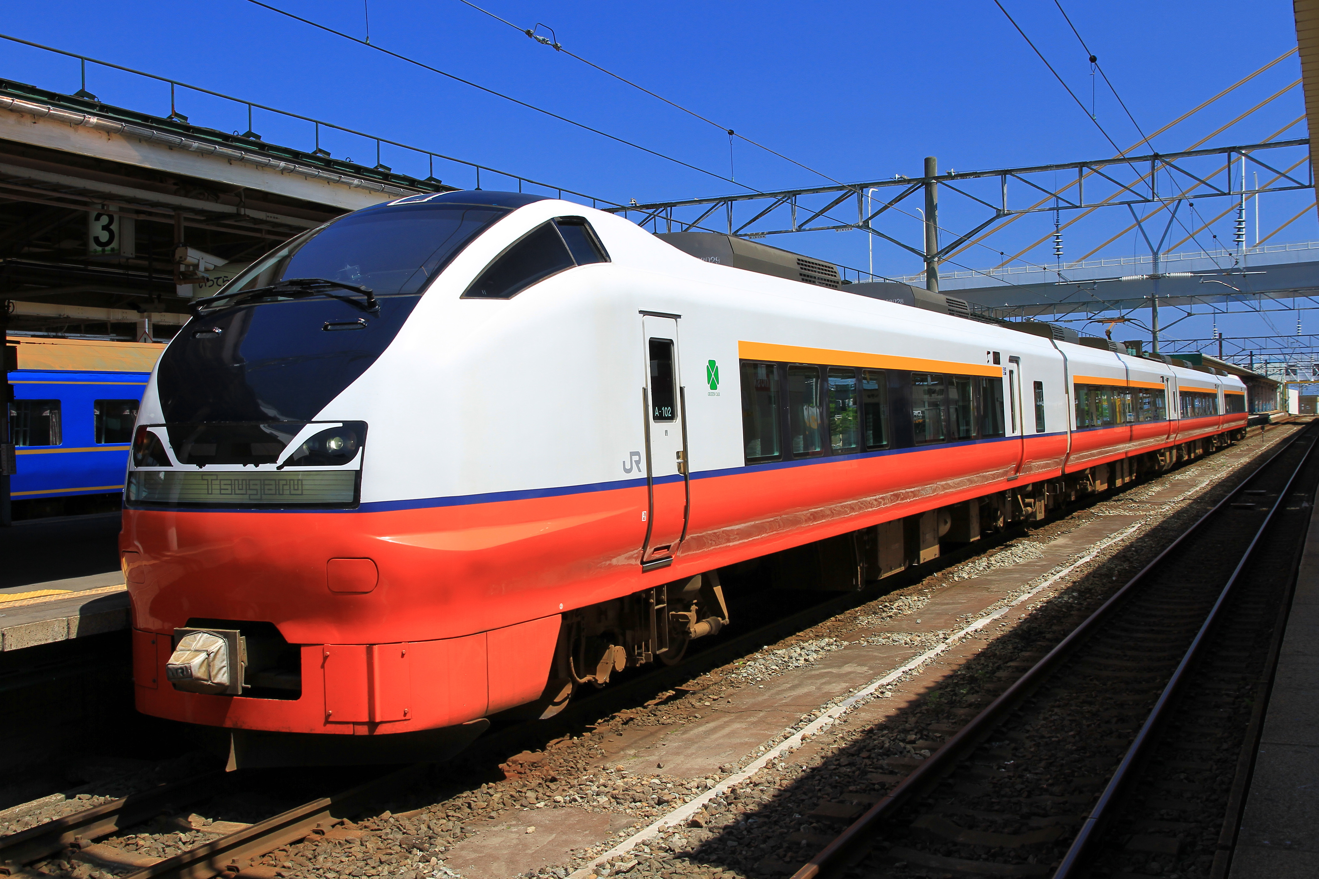 E751系つがる A-102編成 青森駅にて（青森県w:ja:青森市）